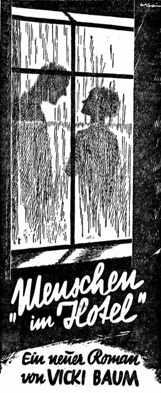 Titel eines Buches von Vicky Baum, anno 1929